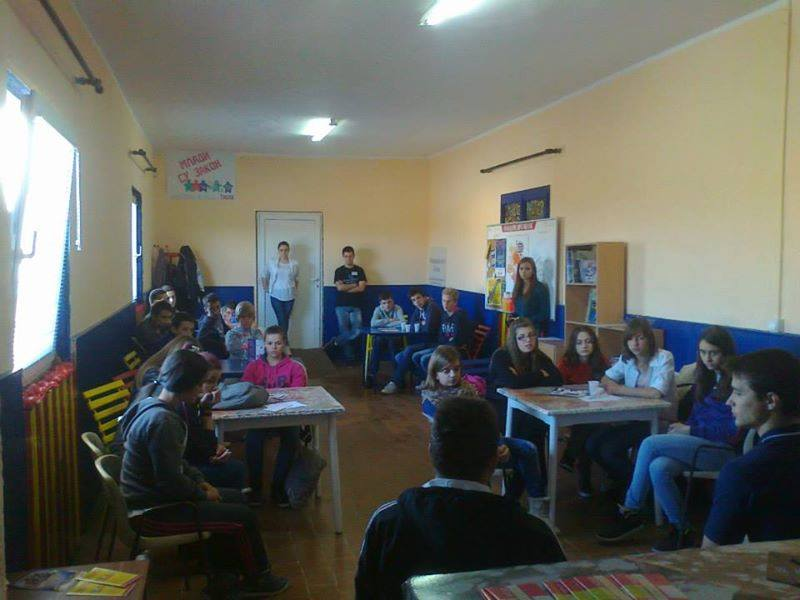 Радионица у Омладинском клубу